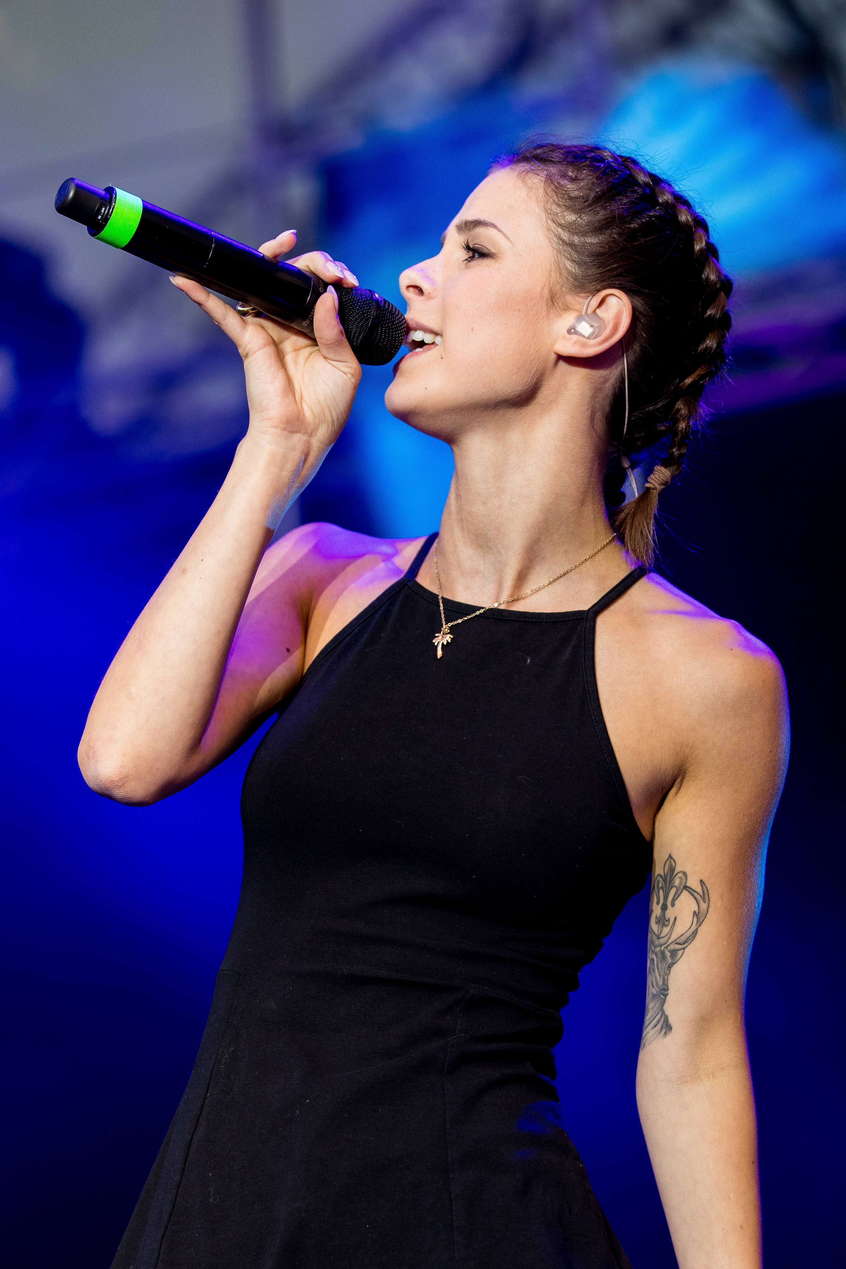 during Stadtfest Ludwigshafen at Stadt, Ludwigshafen, Rheinland Pfalz, Germany on 2016-07-09, Photo: Sven Mandel